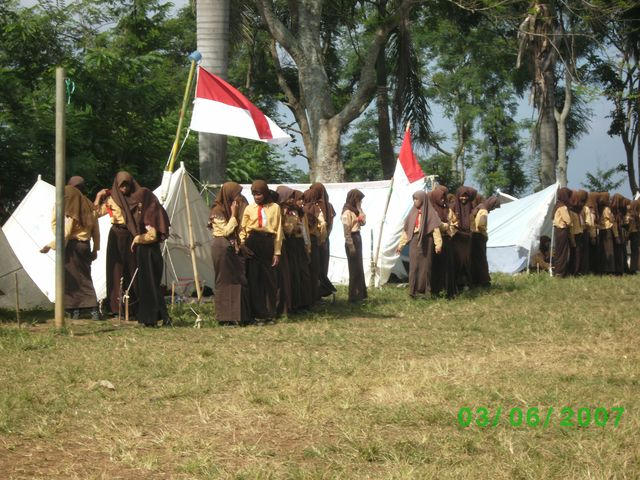 Perkemahan Pramuka Penggalang